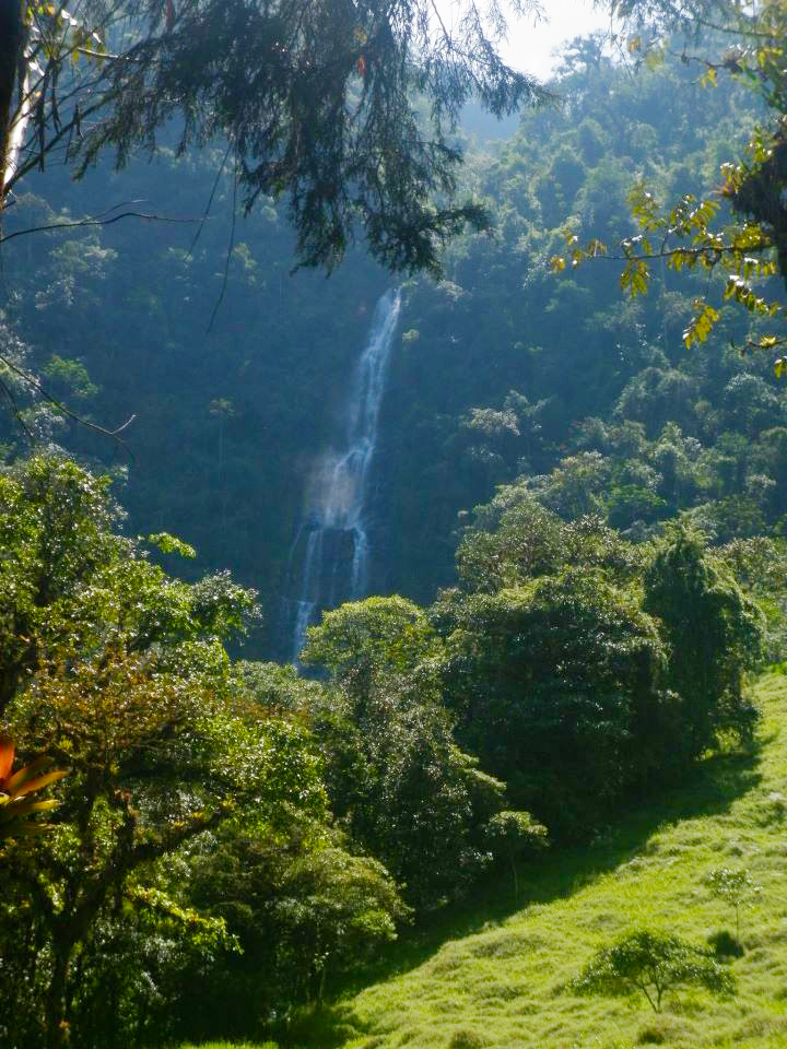 Guayquichums